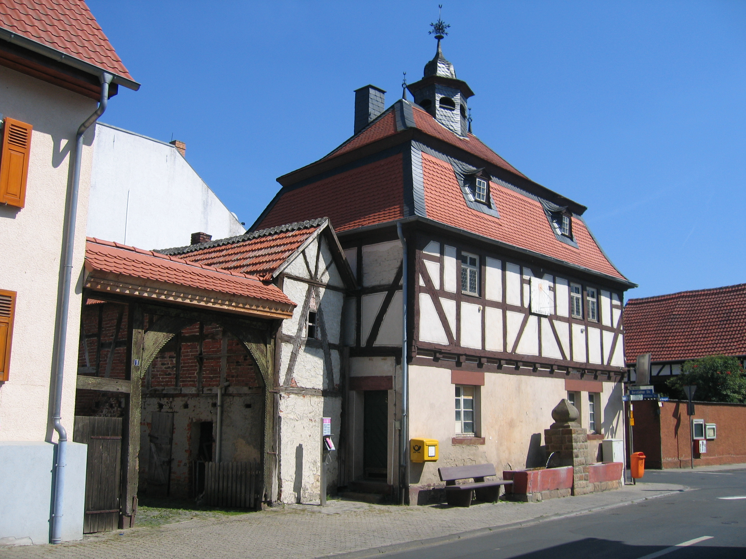 Altes Rathaus mit Brunnen von Wohnbach.